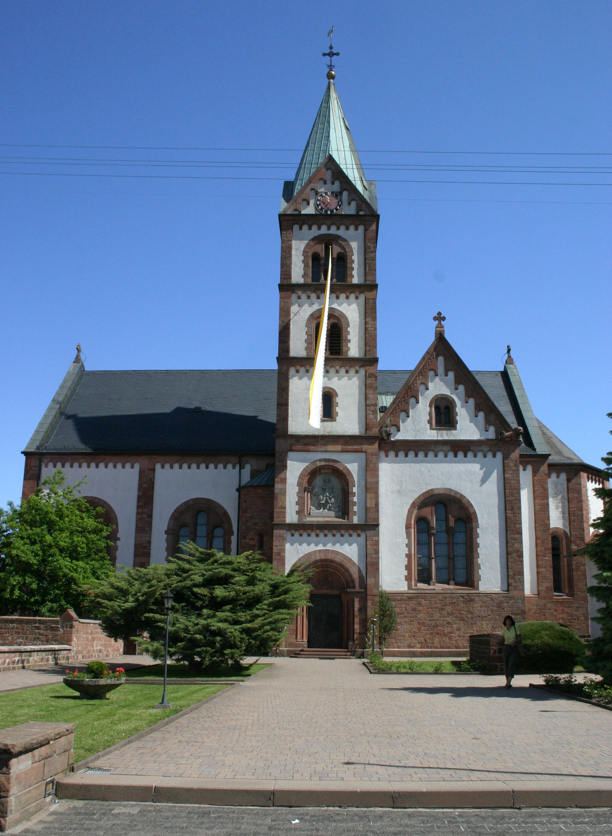 Martinshöhe